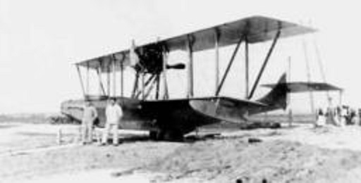 Hydravion Donnet-Denhaut sur le slipway de l'Île-Tudy (1917)